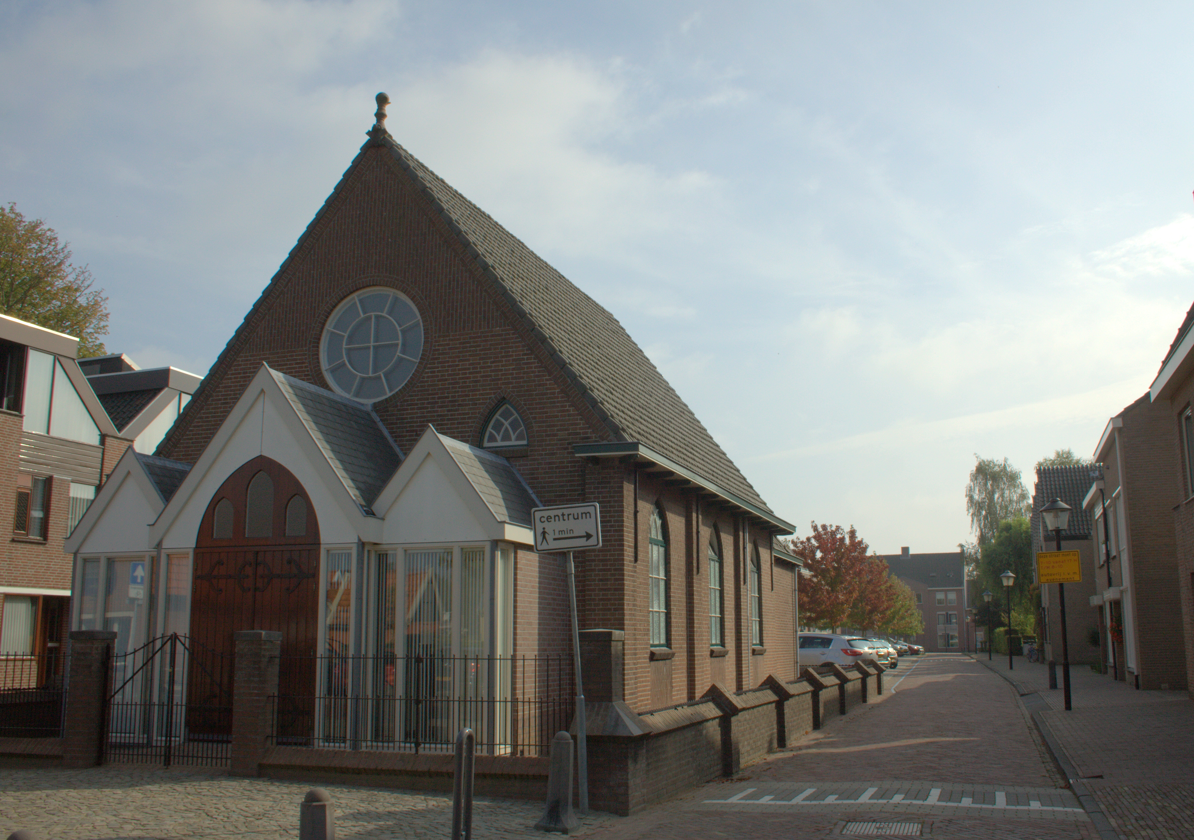 De Christelijk Gereformeerde kerk in de Schoolstraat in Vianen.